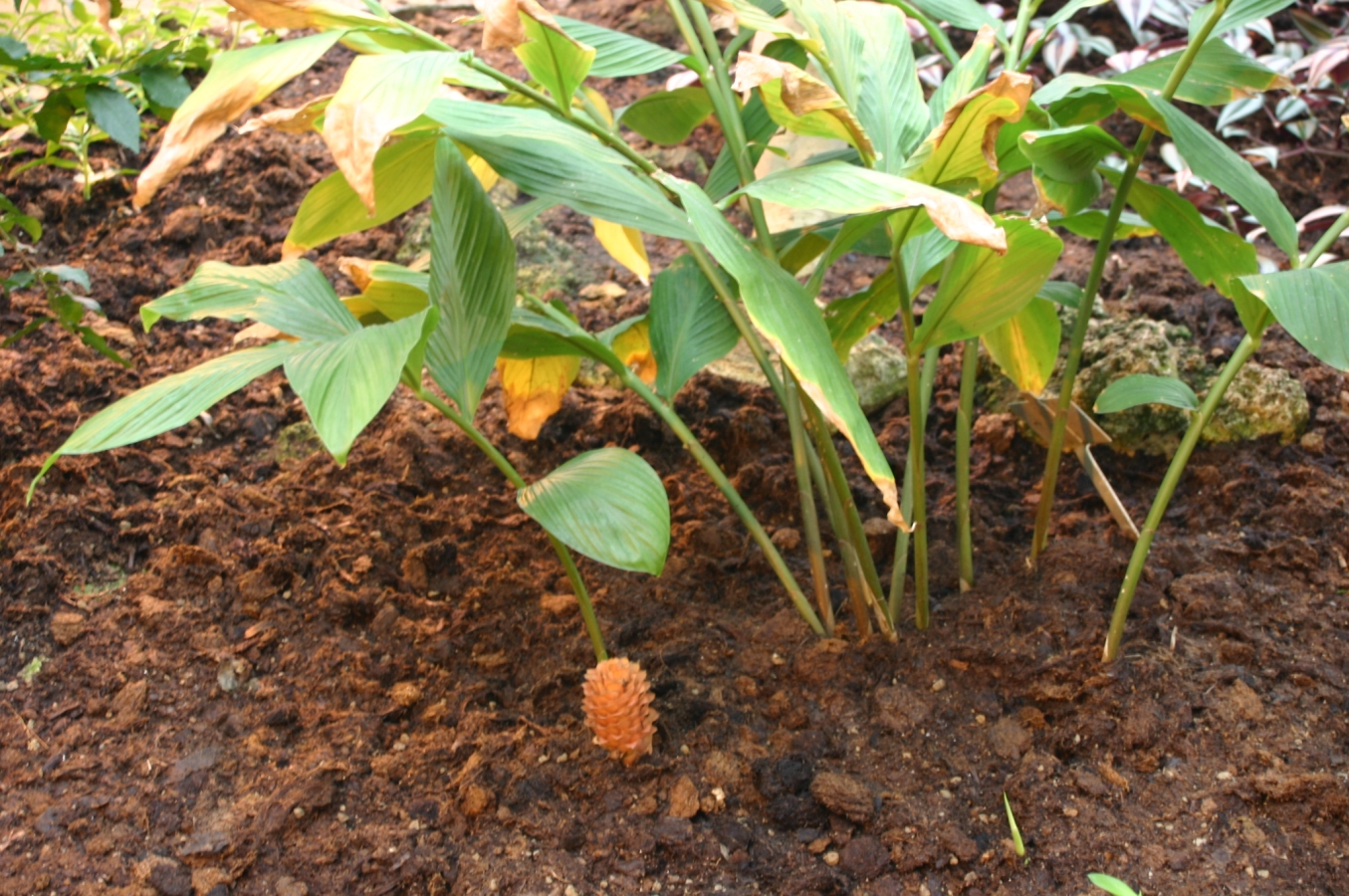 Zingiber zerumbet: Foliage and flower bud.